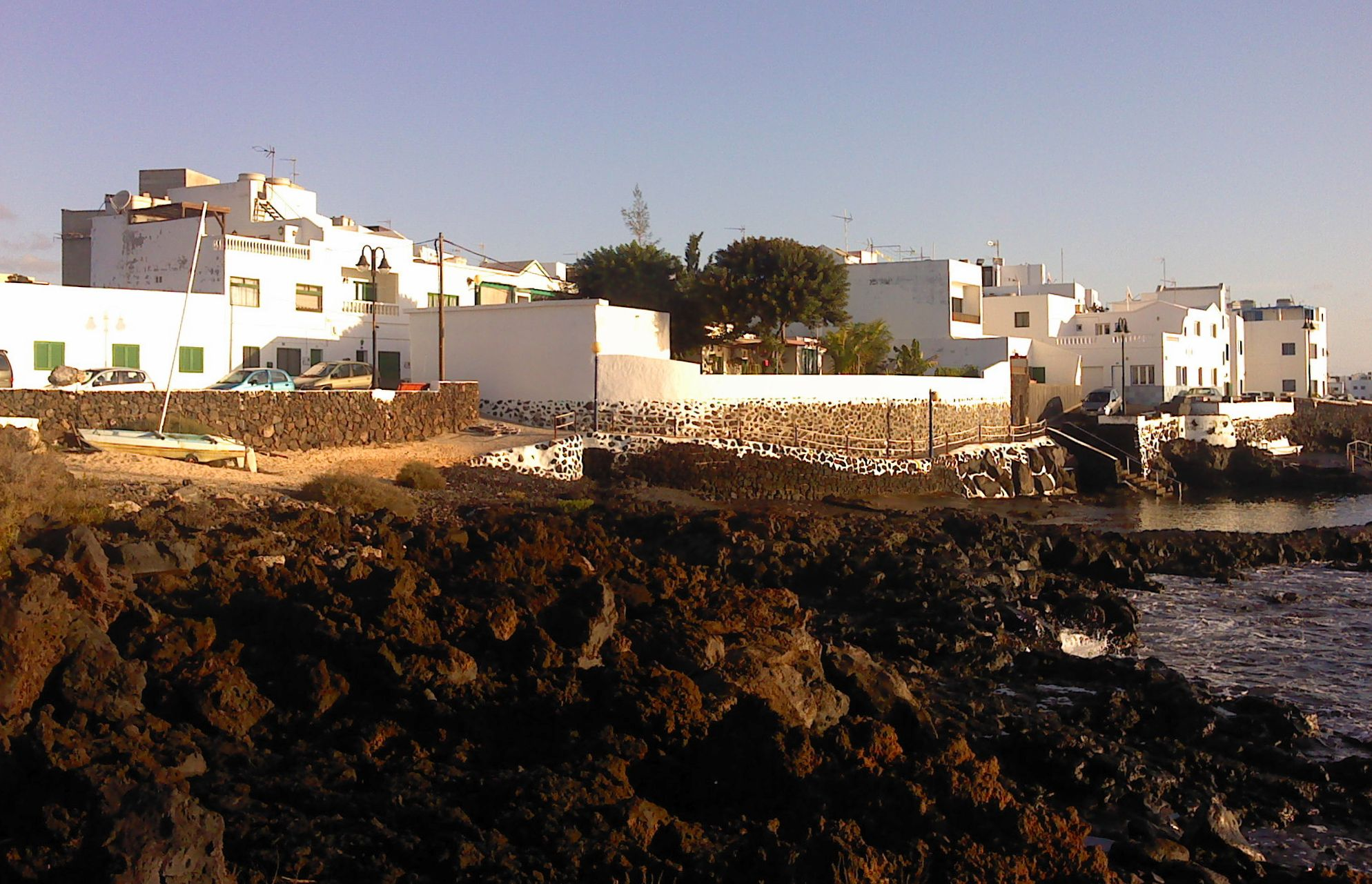 Punta Mujeres, Lanzarote, Kanarische Inseln, Spanien